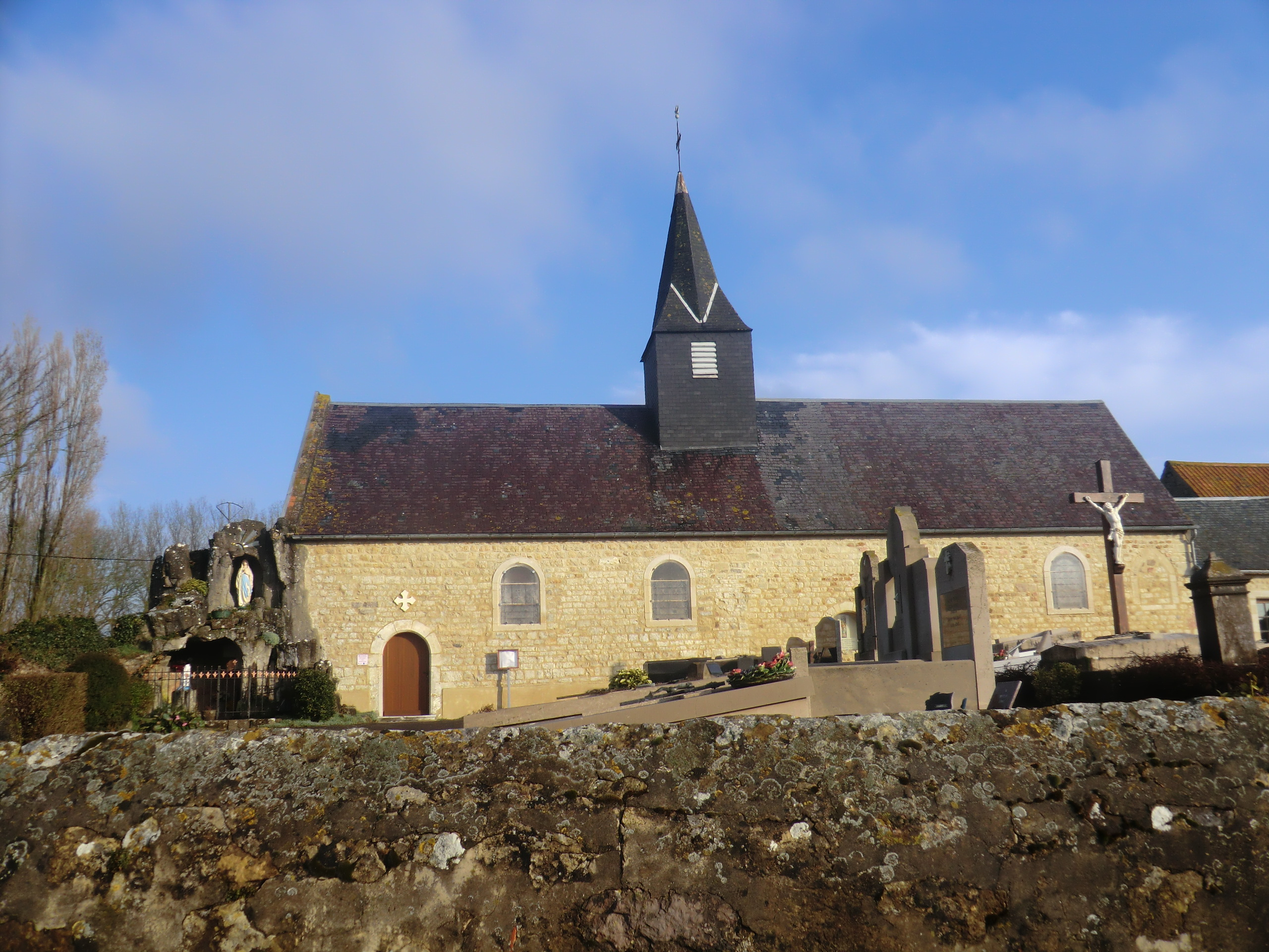 Eglise de Beuvrequen, commune du Pas-de-Calais, en France.